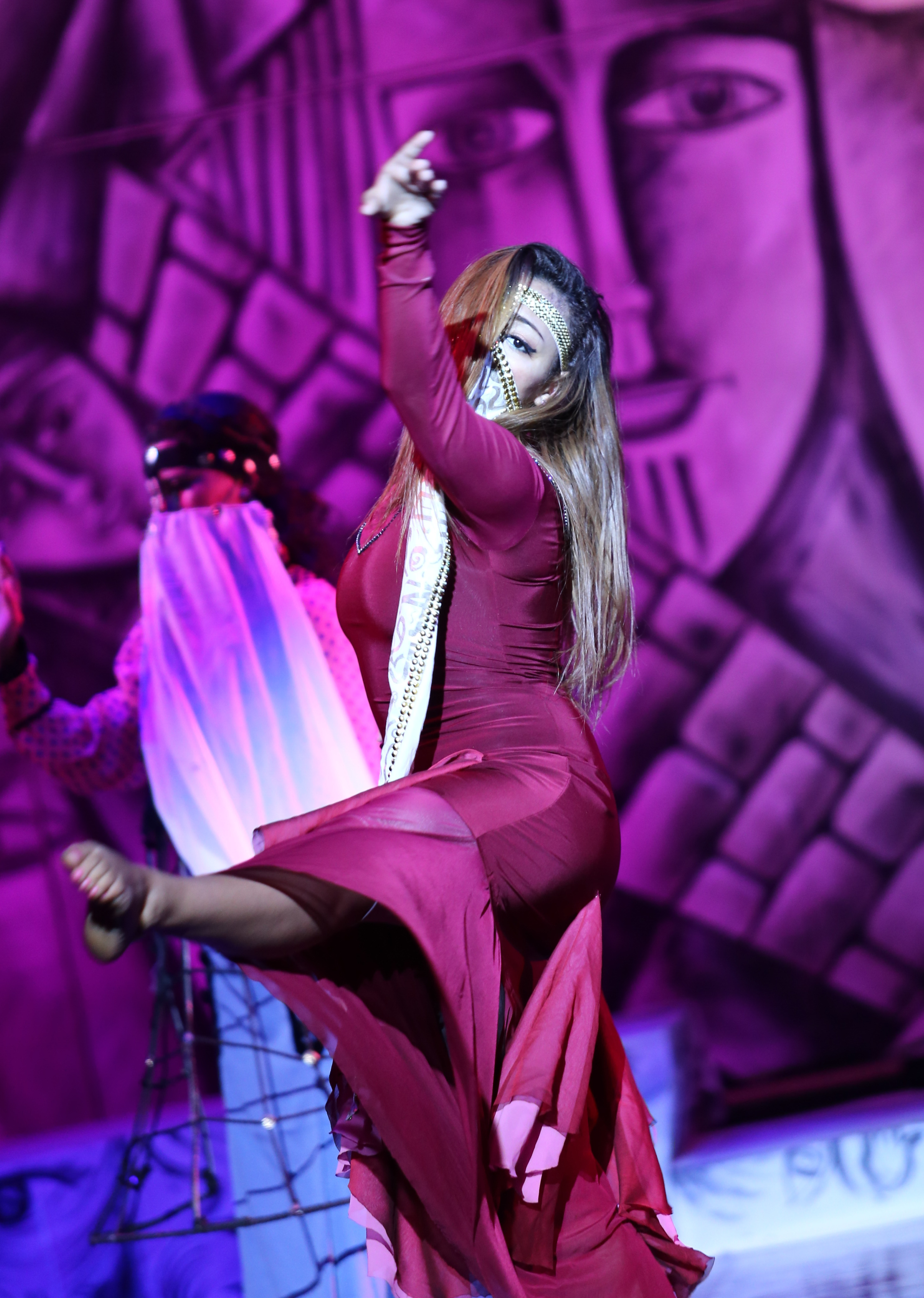 الفلكلور الشعبى فى مصر This is an image of music and dance from Egypt